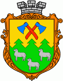 Герб с. Колочава